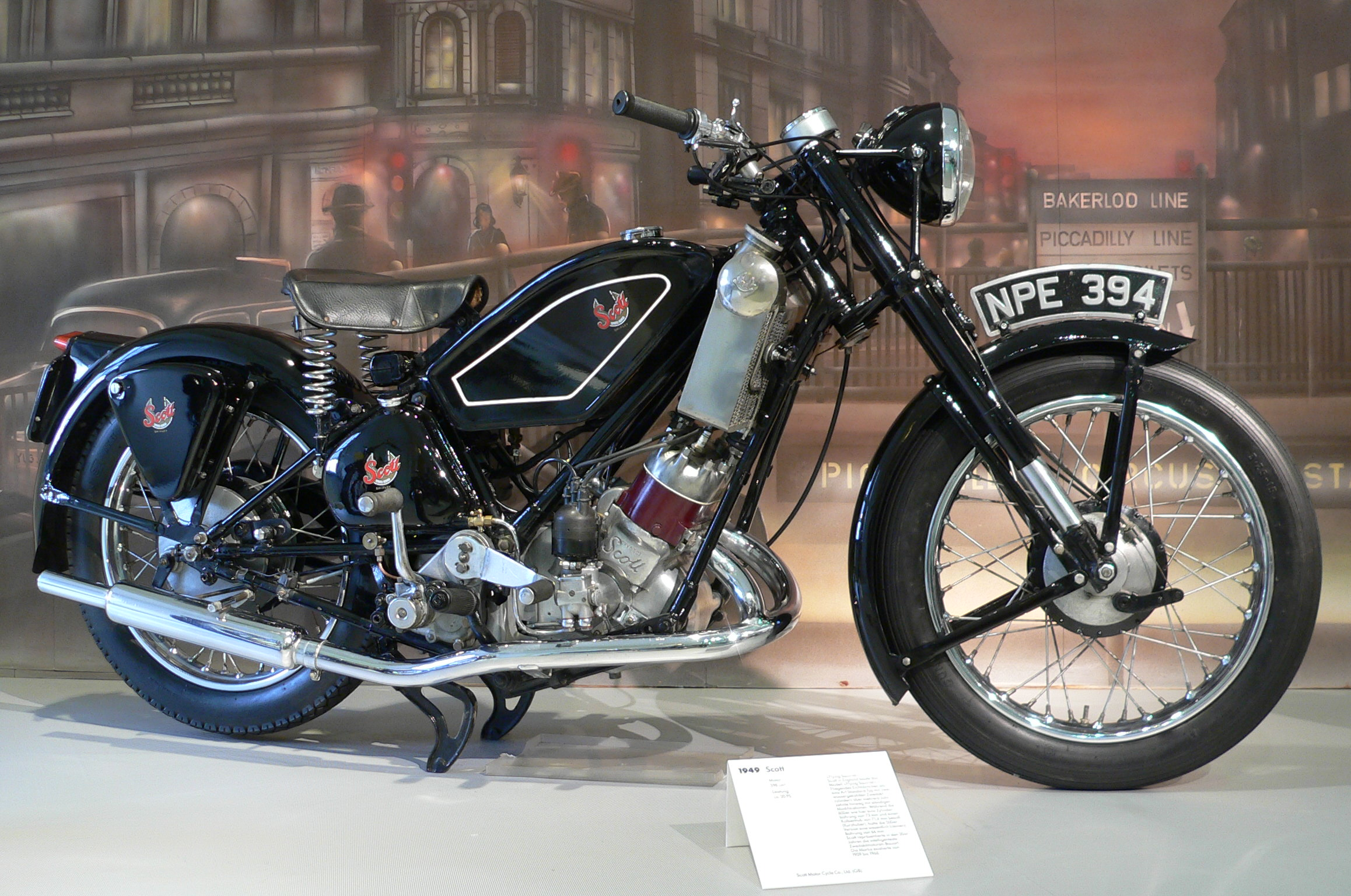 Motorbike "Scott Flying Squirrel" (1949) at the Deutsches Zweirad- und NSU-Museum (598 cm³, ca. 20 PS)